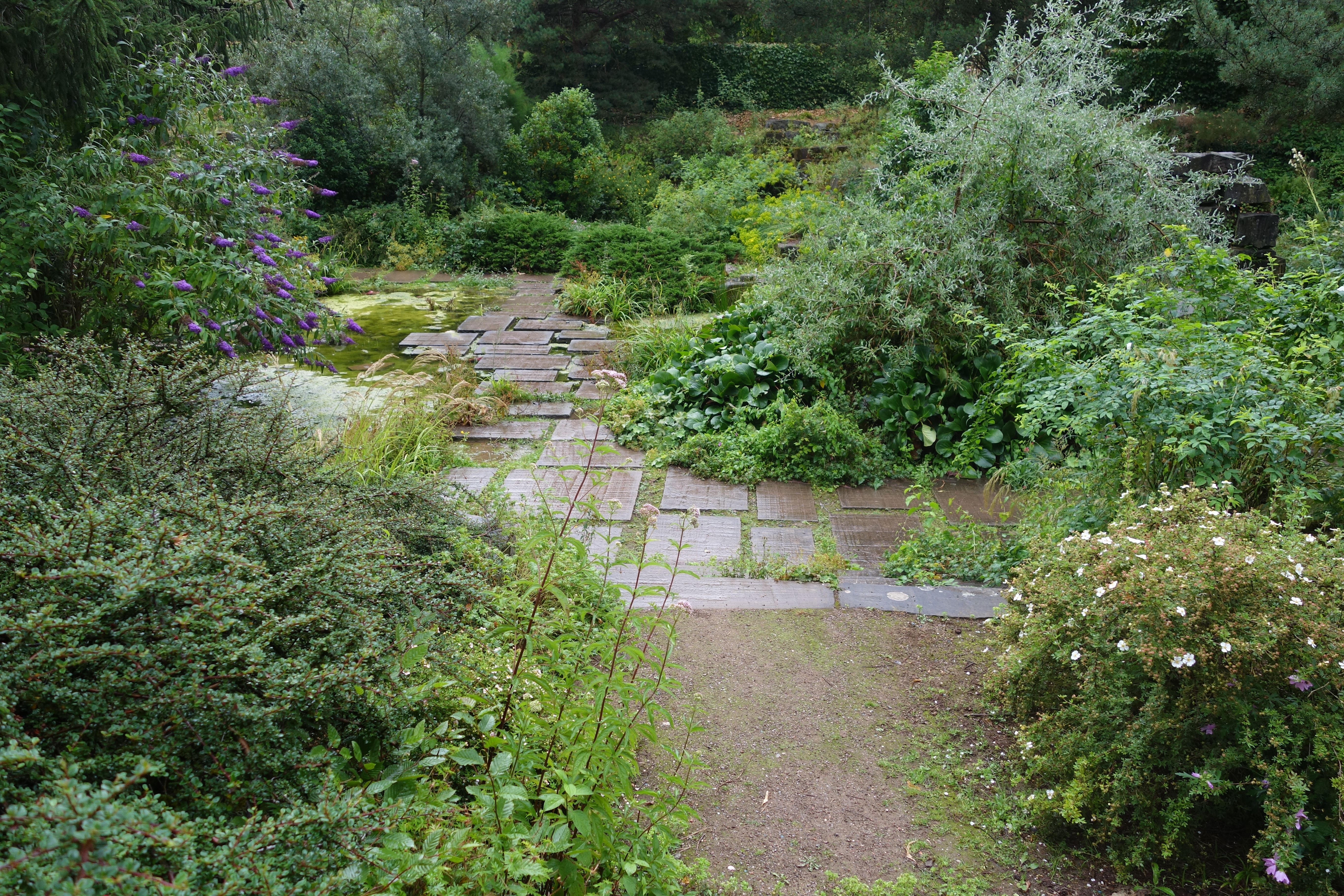 Düsseldorf Volksgarten, Wikipedia-Exkursion vom 20. Juli 2019 (Steingarten).